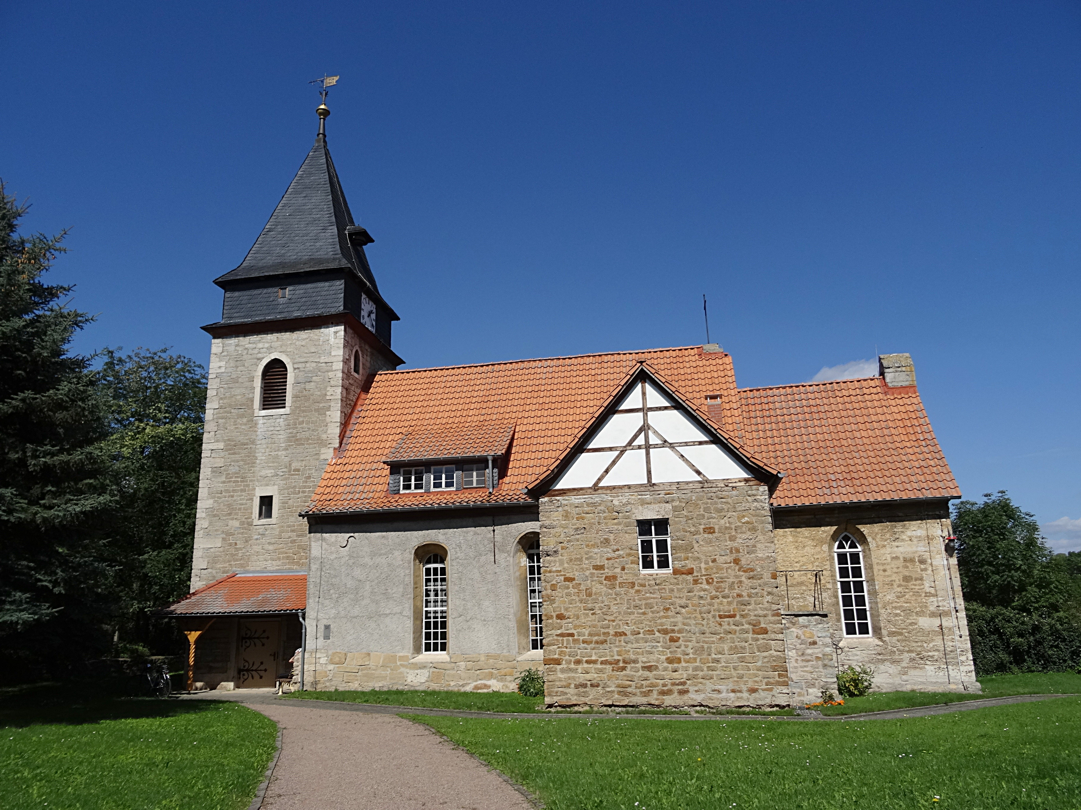 Dorfkirche St. Anna Tottleben